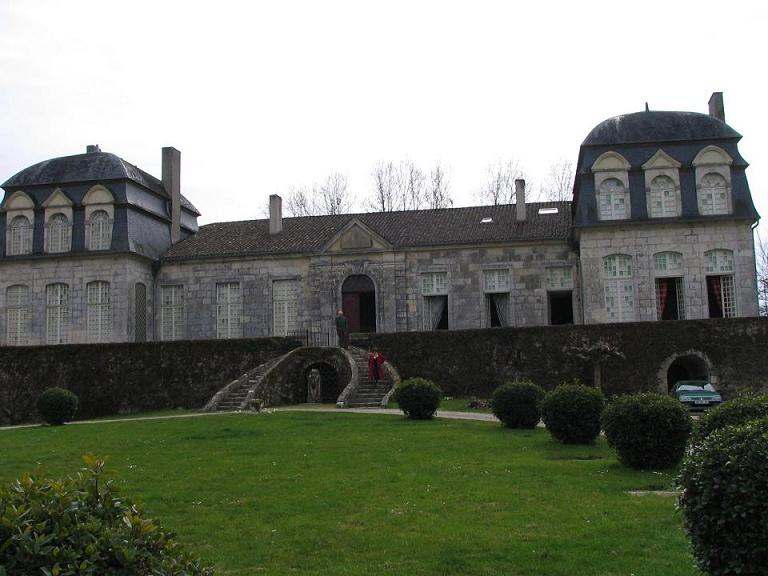 Castillo familiar donde nació Adela